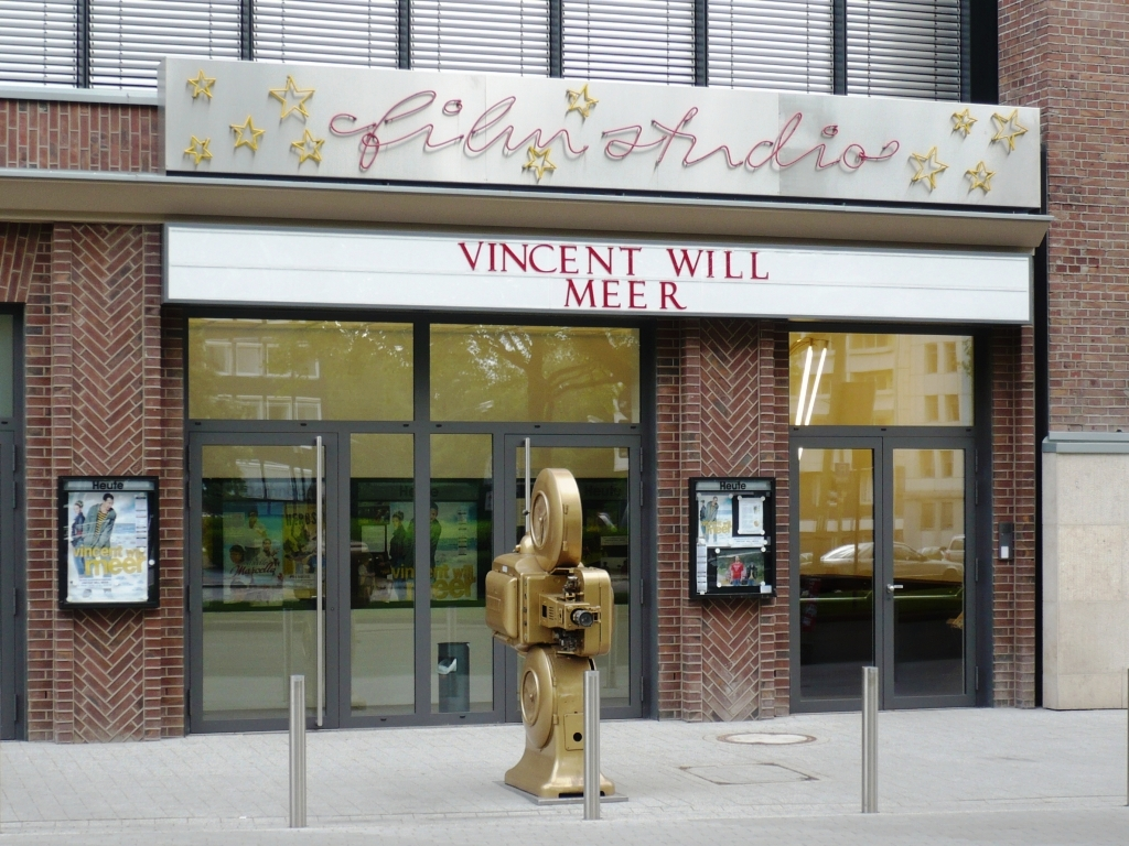 Filmstudio Glückauf in Essen-Rüttenscheid